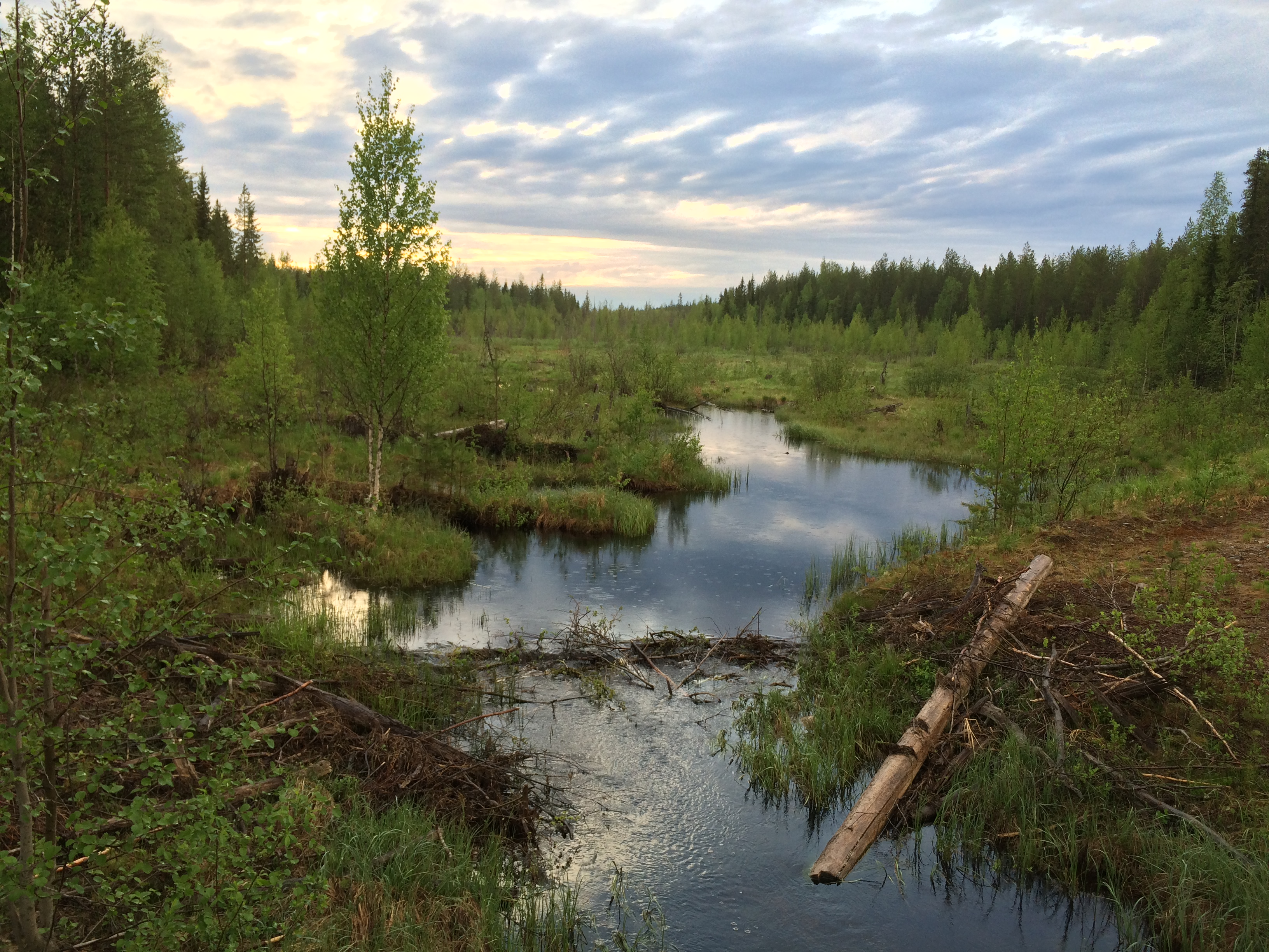 река Марья (Карелия)